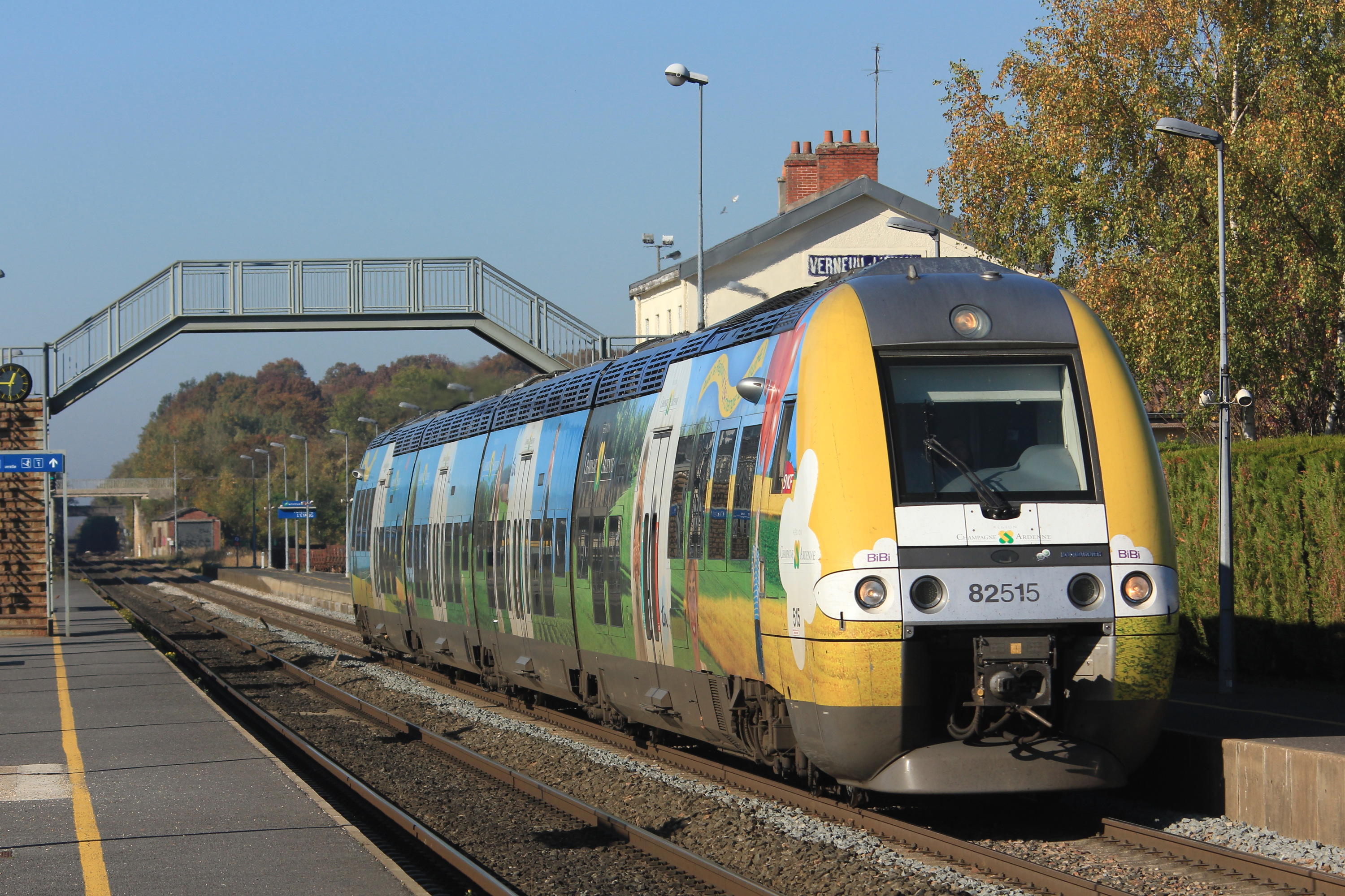 L'engin B 82515/6 en livrée Champagne-Ardennes passe en gare de Verneuil-l'Étang sur le train Intercités n° 11649 Paris-Est - Culmont-Chalindrey.